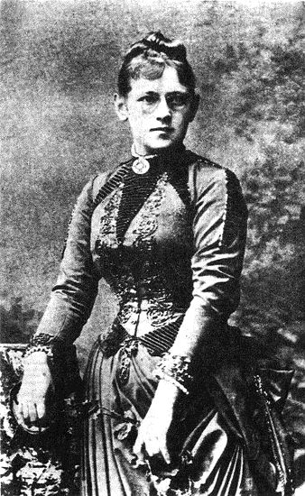 Varvara Pashenko 1892